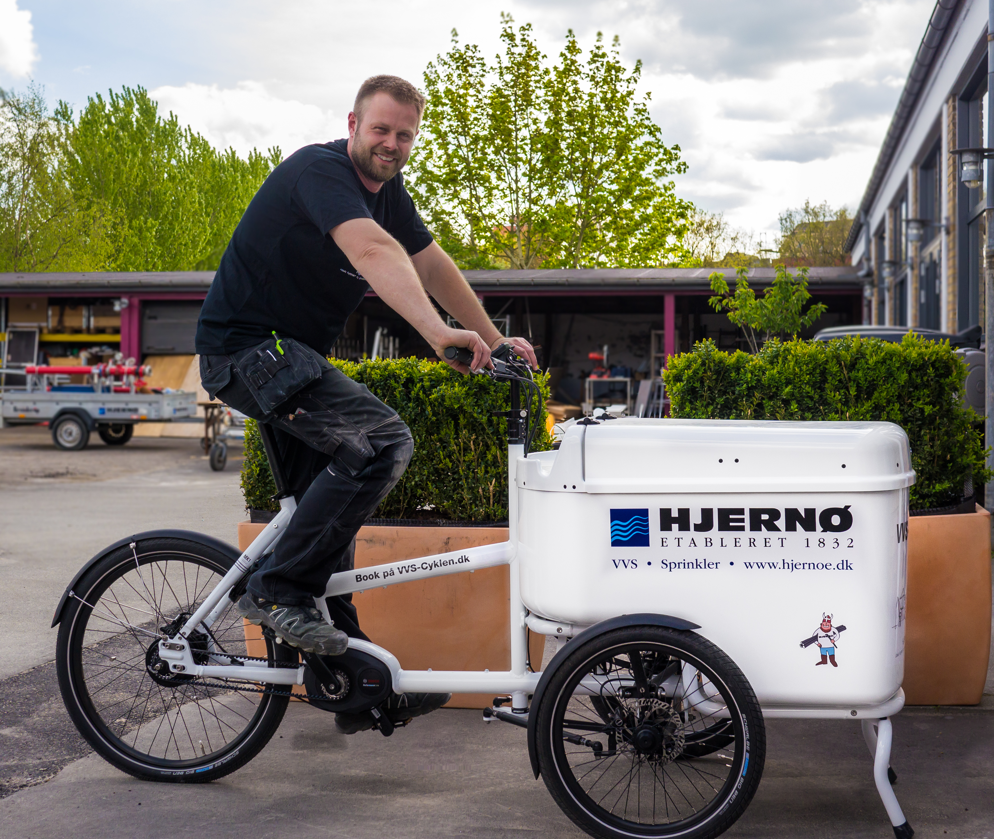 VVS-montør på Hjernøs VVS-cykel, 2017.